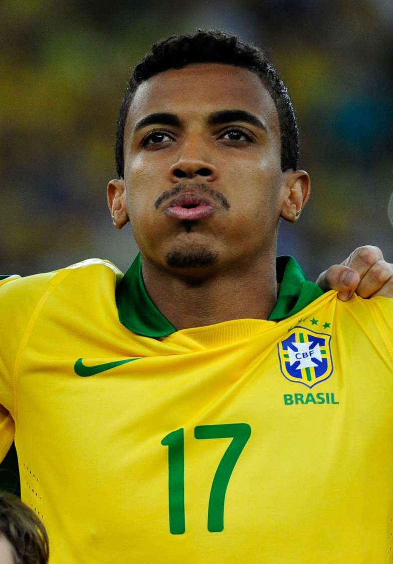 Brasil e Espanha jogam no Maracanã a final da Copa das Confederações.